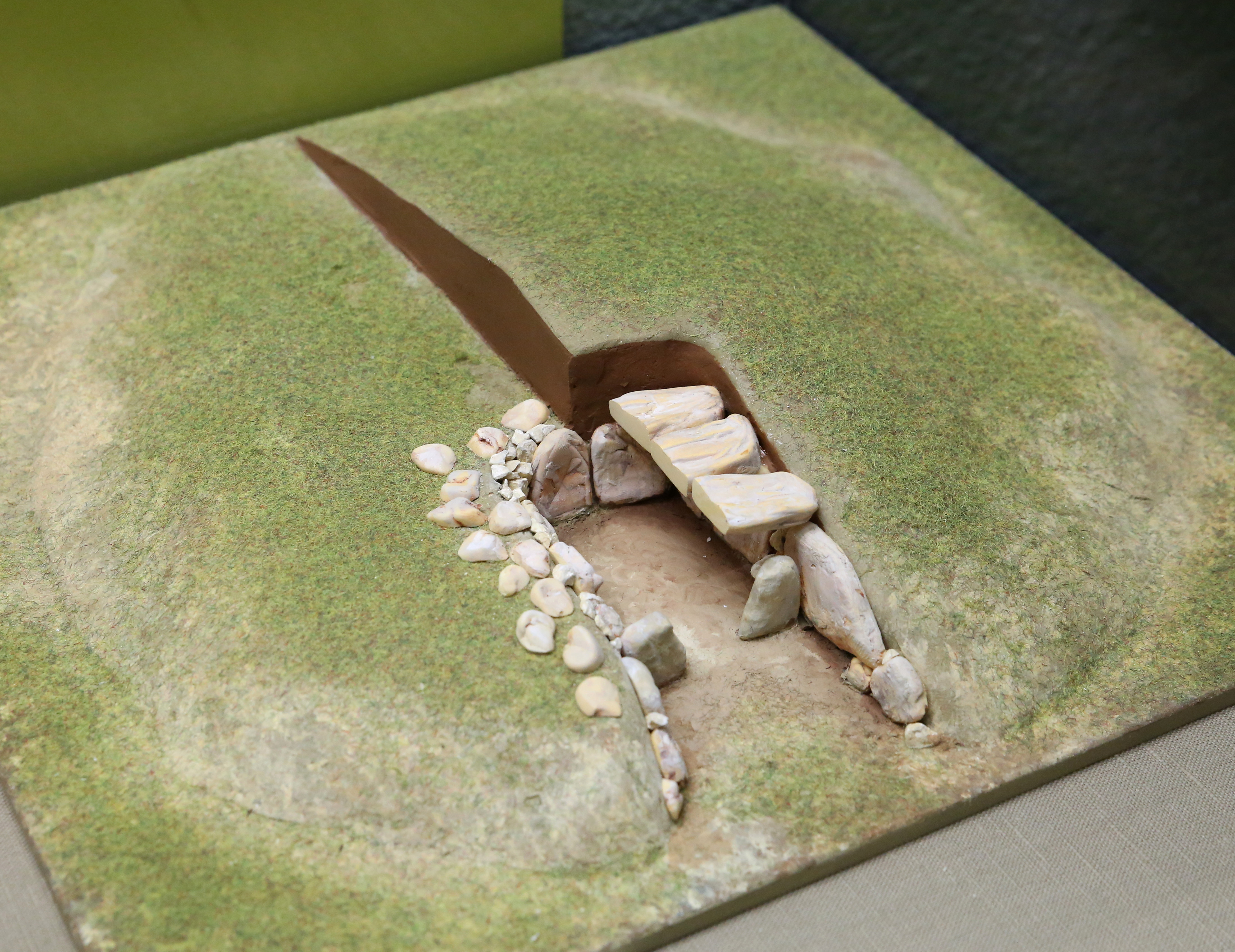 Coupe Allée couverte de Barbehère, Médoc.